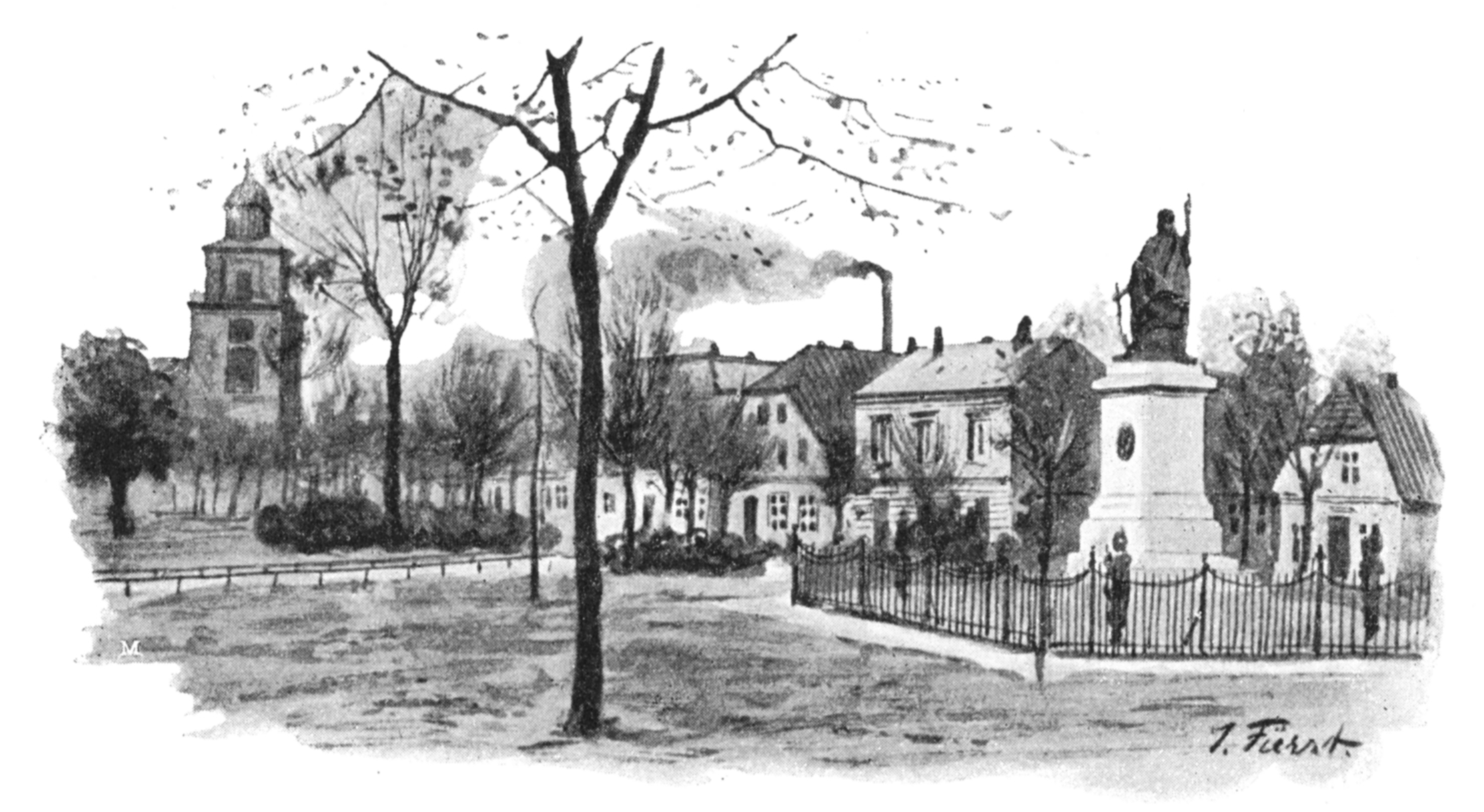 In den Anlagen von Neumünster von Julius Fürst